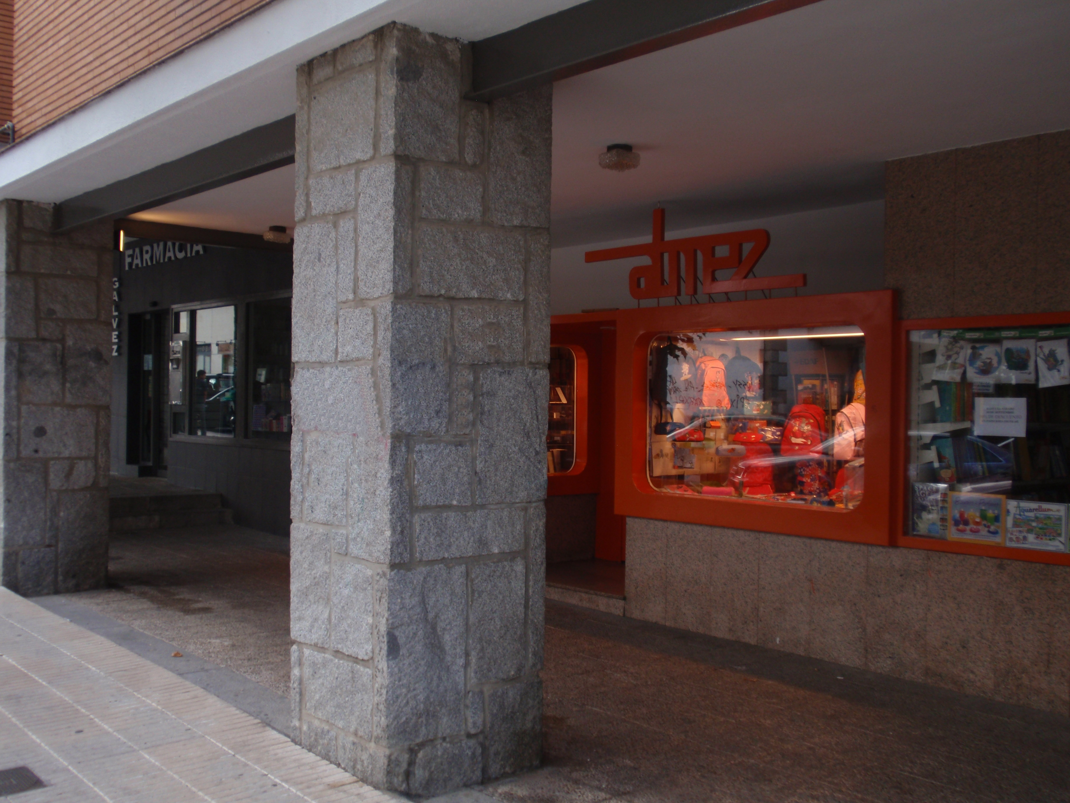 Torrelodones. Soportales donde está sitúa la farmacia.